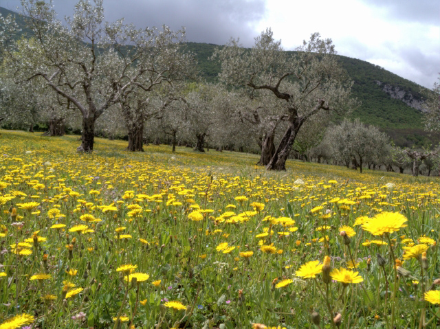 Un oliveto sulle pendici del Camposauro a Solopaca (BN)